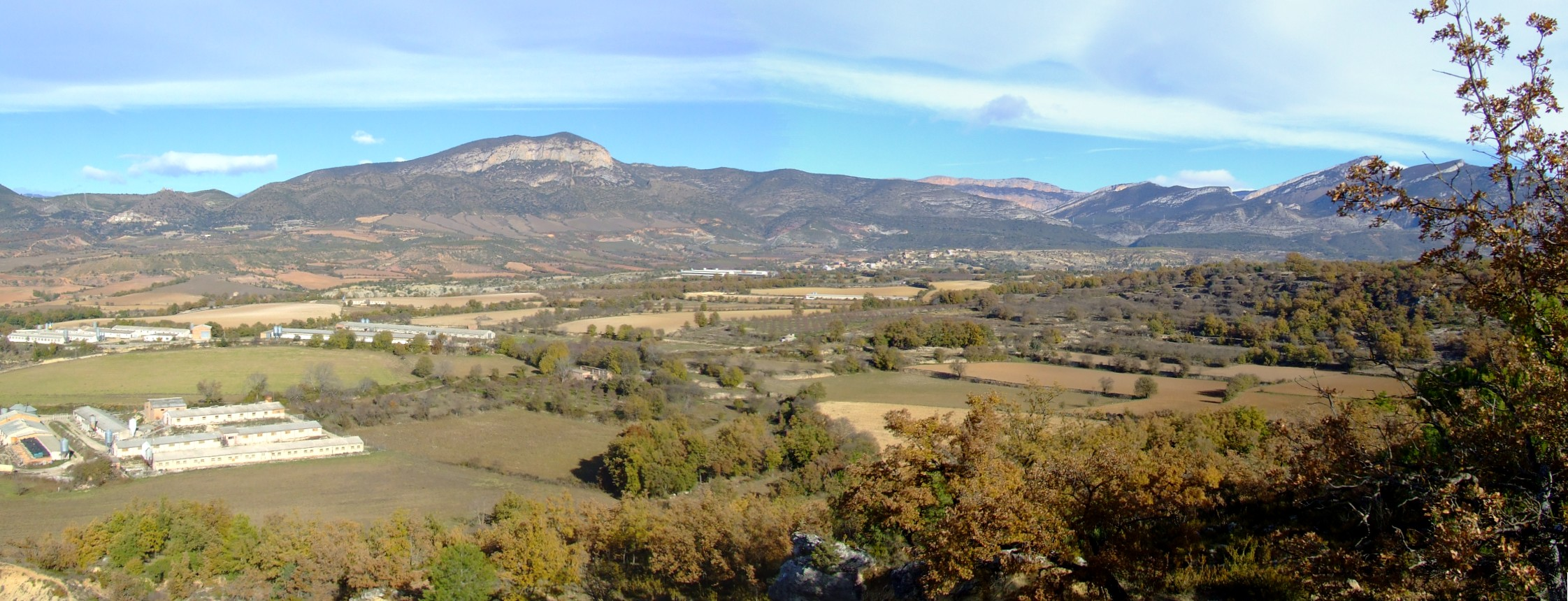 La meitat oriental del terme d'Orcau, des del sud-est (Orcau, Isona i Conca Dellà, Pallars Jussà)